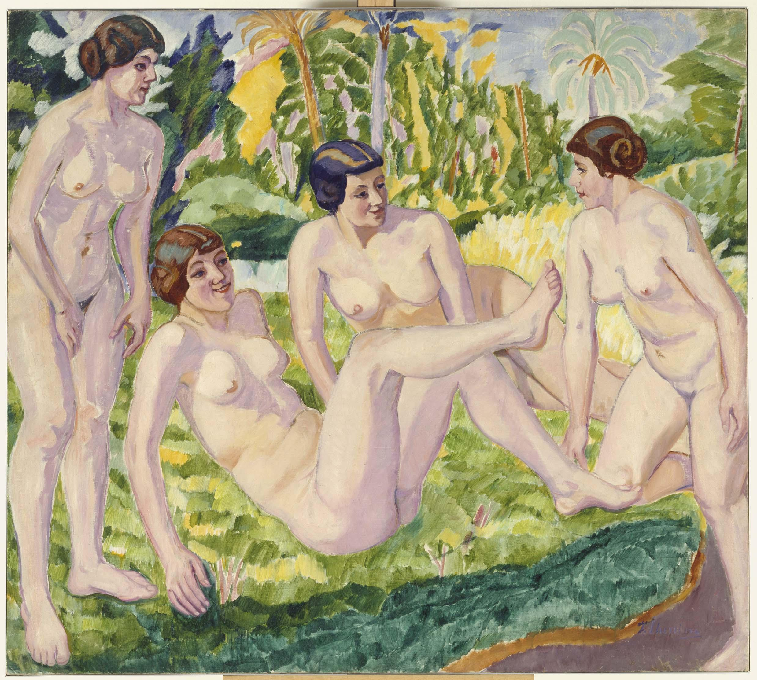 Desnudos en un paisaje (1906-18), de Francisco Iturrino González. Museo Nacional Centro de Arte Reina Sofía, Madrid, España